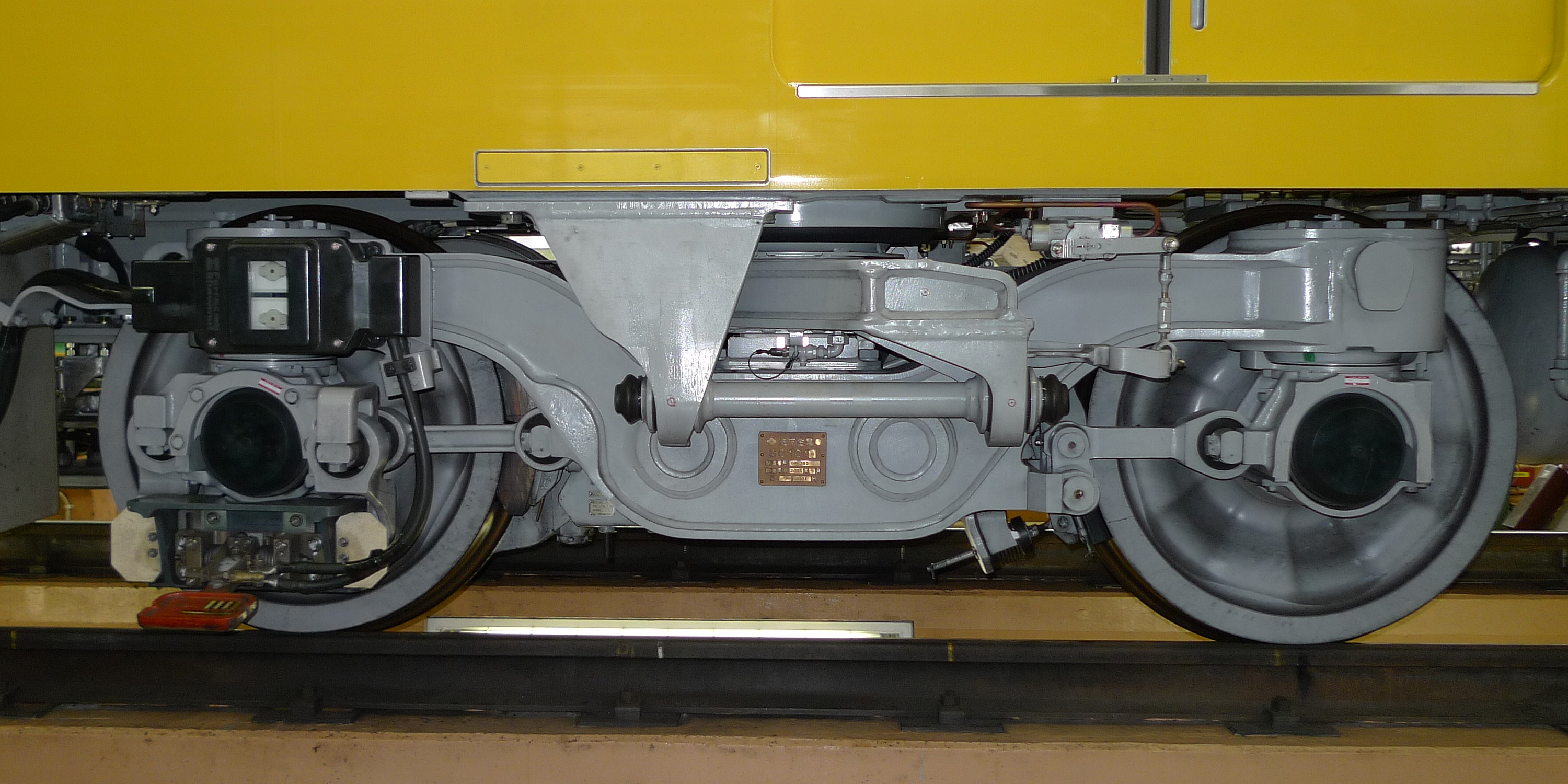 東京メトロ1000系SC101台車 中野車両基地にて許可を得て撮影